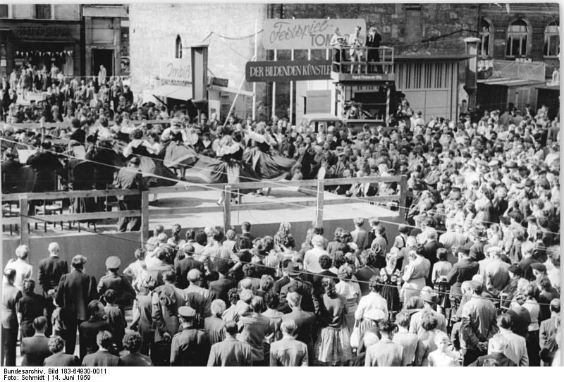 Halle/Saale, I. Arbeiterfestspiele, Tanzgruppe Zentralbild Schmidt Fröhl.-Schä 14.6.1959 1. Arbeiterfestspiele in der DDR. Am Samstagnachmittag, dem 13.6.1959, traten auf der Freilichtbühne des Obermarktes von Halle (Saale) Volkskunstgruppen auf. UBz: Die Sauerländer Quadrille, dargeboten von der Tanzgruppe der IG Energie- Post- und Transportwesen.